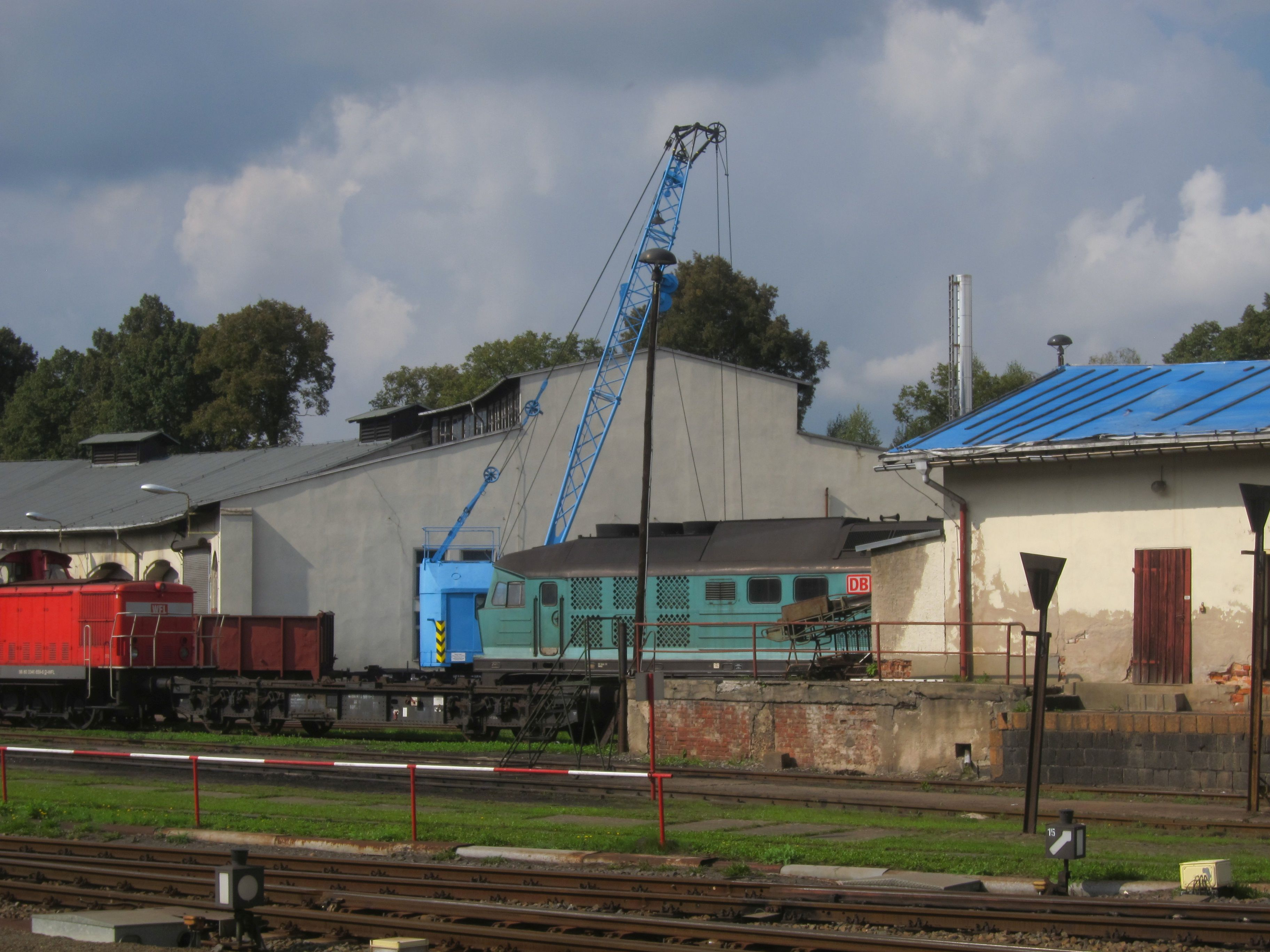 Bahnhof Nossen, Bahnbetriebswerk